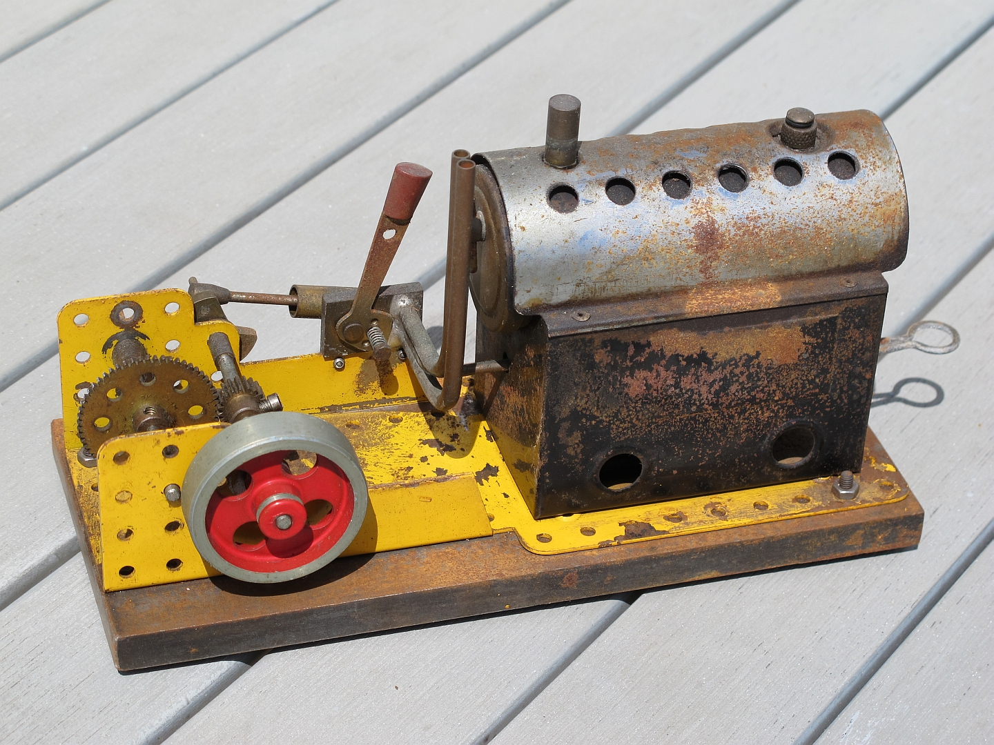 Machine à vapeur Meccano de 1970.